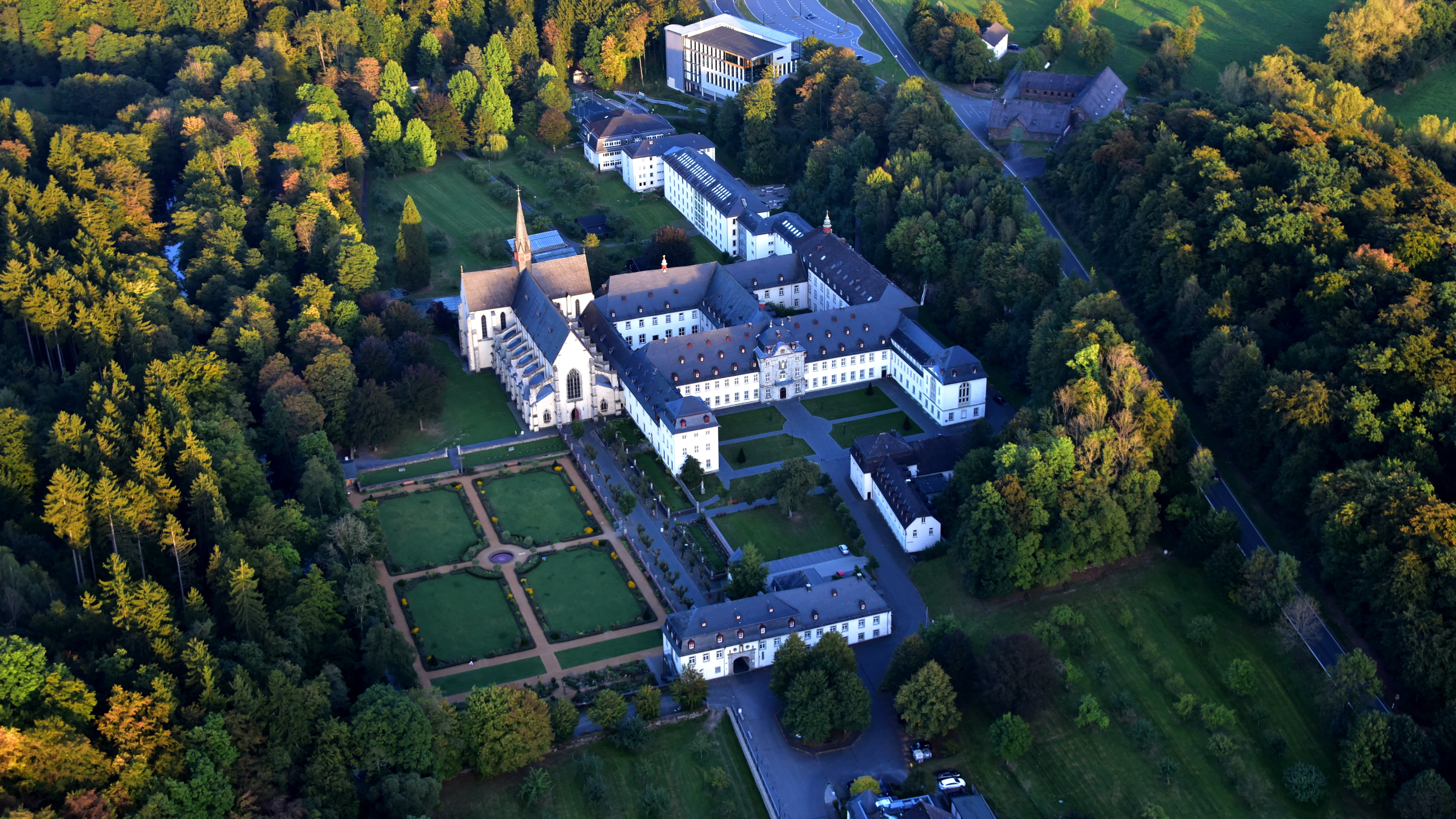 Abtei Marienstatt, Luftaufnahme (2016)